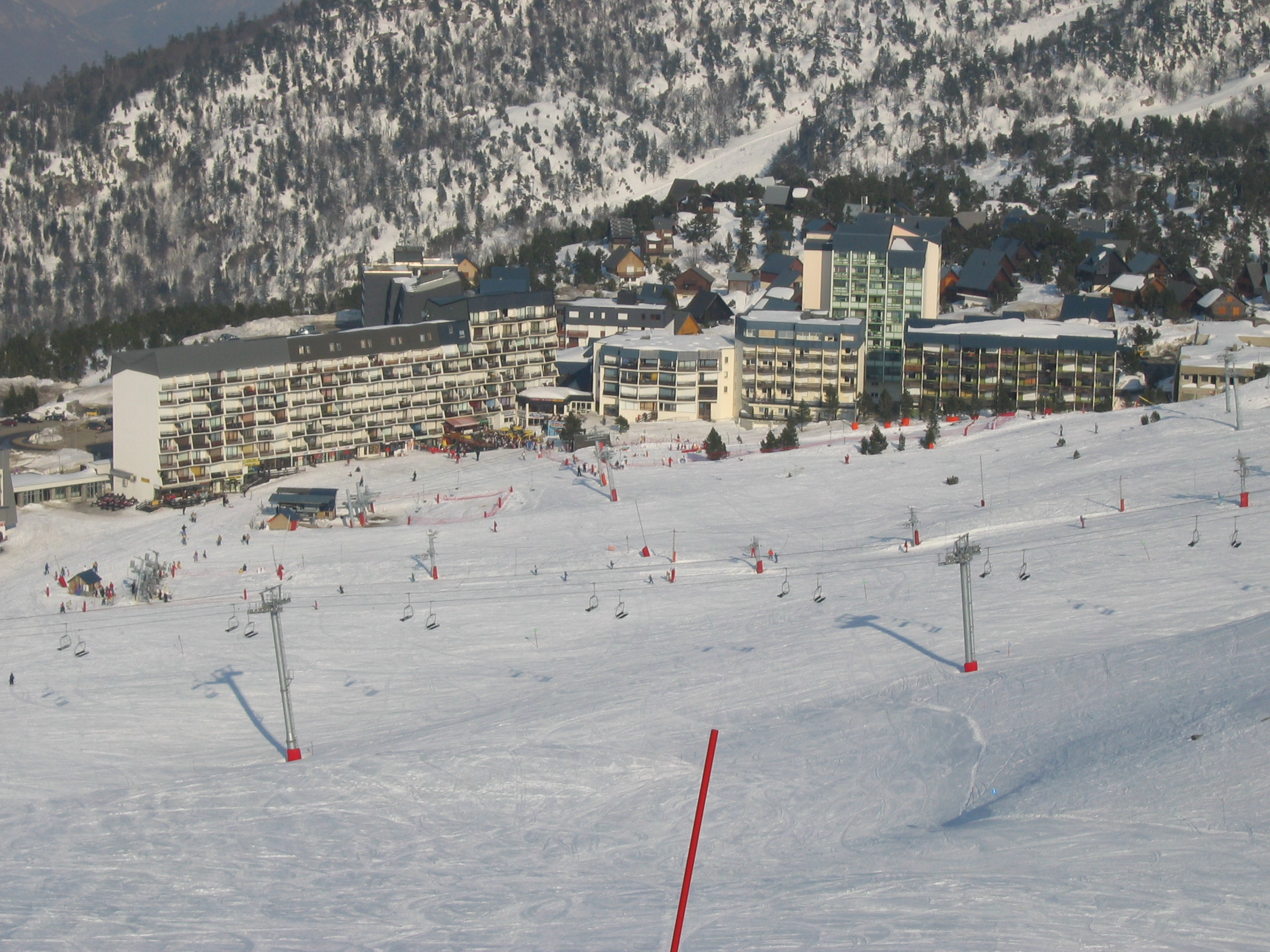 La Pierre Saint Martin, photo personnelle